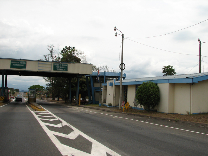 Peaje de Naranjo, Carretera Interamericana Norte abril de 2007